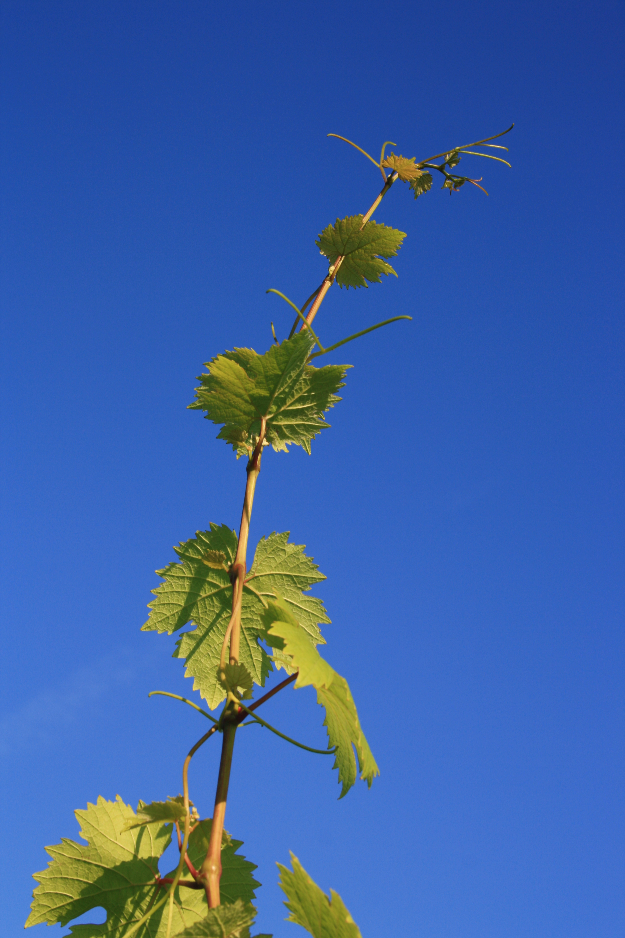 Triebspitze eines Riesling Weinstocks; Weingut H. T. Eser - Christoph & Thomas Eser (Lenchen)